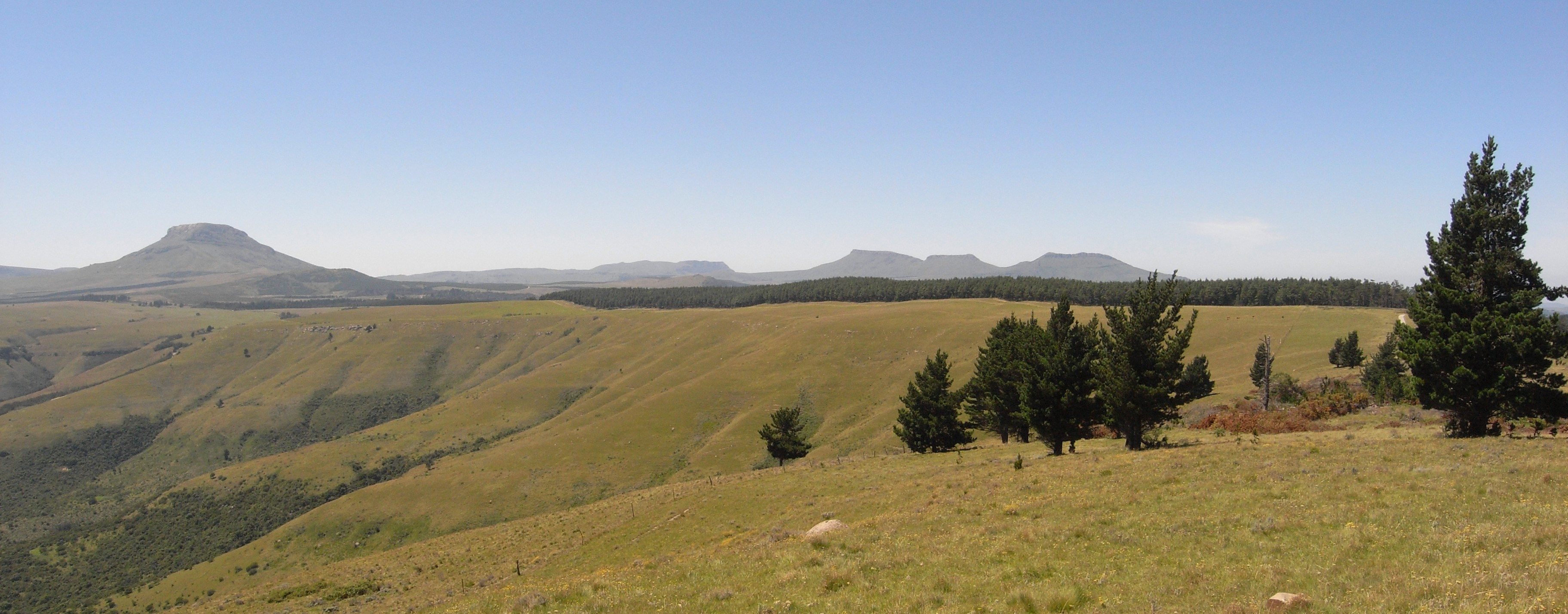 Fernsicht in den hochgelegenen Graslands